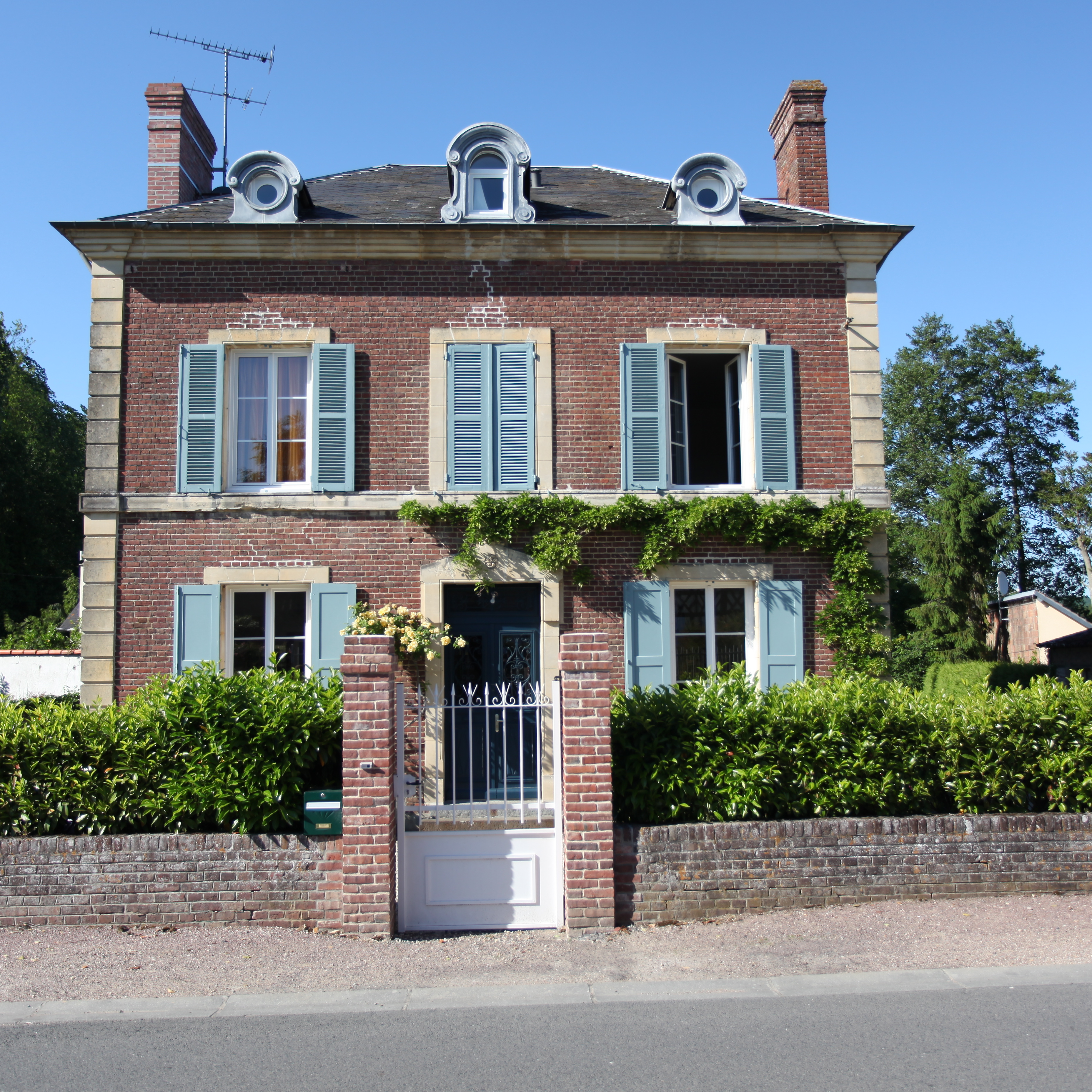 Saint-Julien le Faucon, Calvados, France. L'ancien presbytère, rue de Livarot.